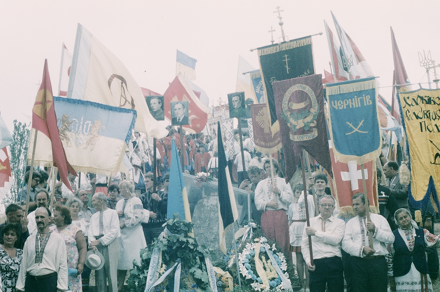 500 років Українському козацтву. 1990.: фото